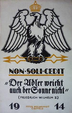 Moto F.W.I. von Preussen